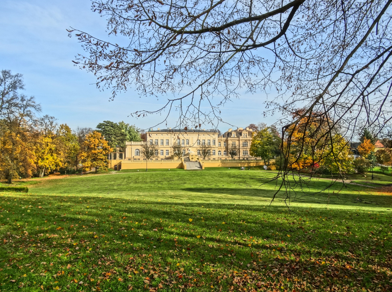 Ostromecko k. Bydgoszczy, pałac, tzw. Nowy, zbud. 1835-1848, 1891